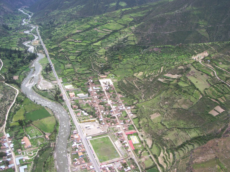 Vista Aerea de Chalhuanca